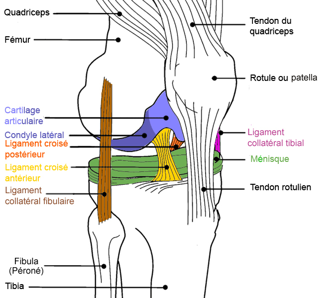 Diagramme du genou en couleur corrigé